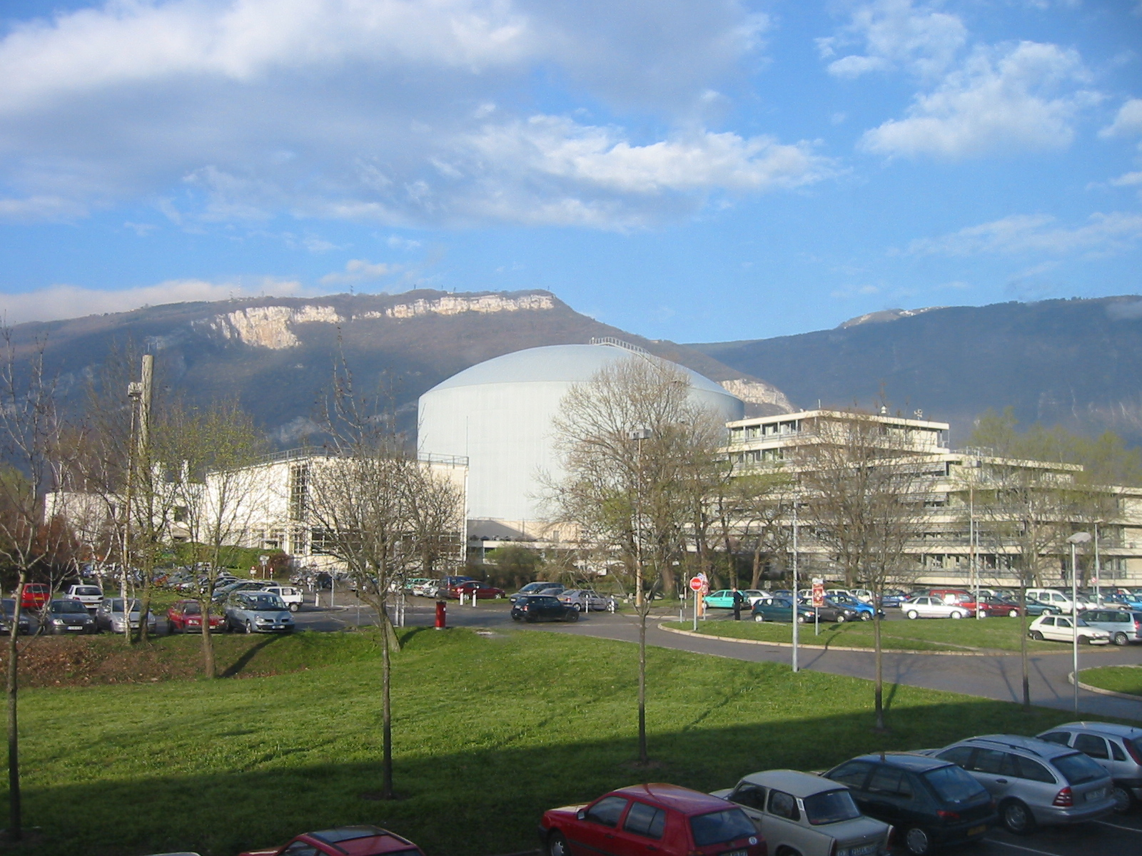 Eng: The Institut Laue-Langevin in Grenoble, France, is one of the most intense sources of research neutrons in the world. The reactor and some of the instruments lie under the dome; others are in halls around it. Picture taken by wurzeller on 1 Apr 2004 and hereby released into public domain Fr: L'Institut Laue-Langevin à Grenoble, France, est un des plus importantes sources de neutrons pour recherche du monde. Le réacteur et quelques-uns des instruments se trouvent sous la coupole; d'autres sont dans des salles autour de lui. Fait par wurzeller le 1 avril 2004 et libéré dans le domaine public par l'auteur